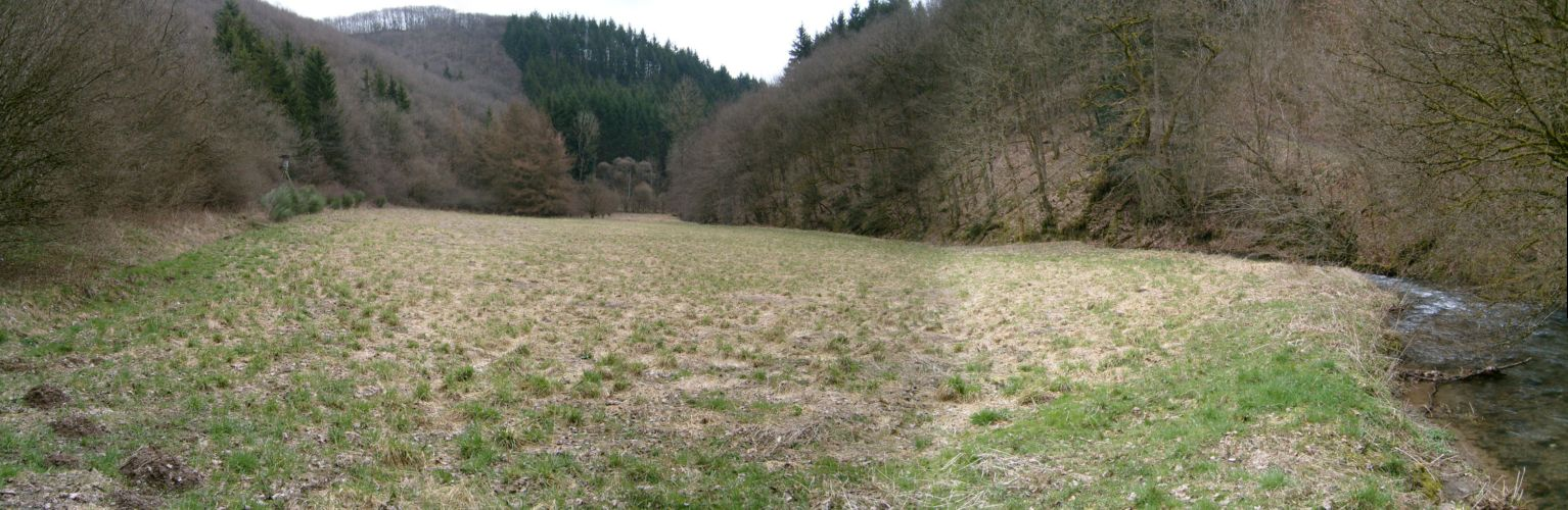 De Bleesdall beim Weidendell südlech vun Grooljen.